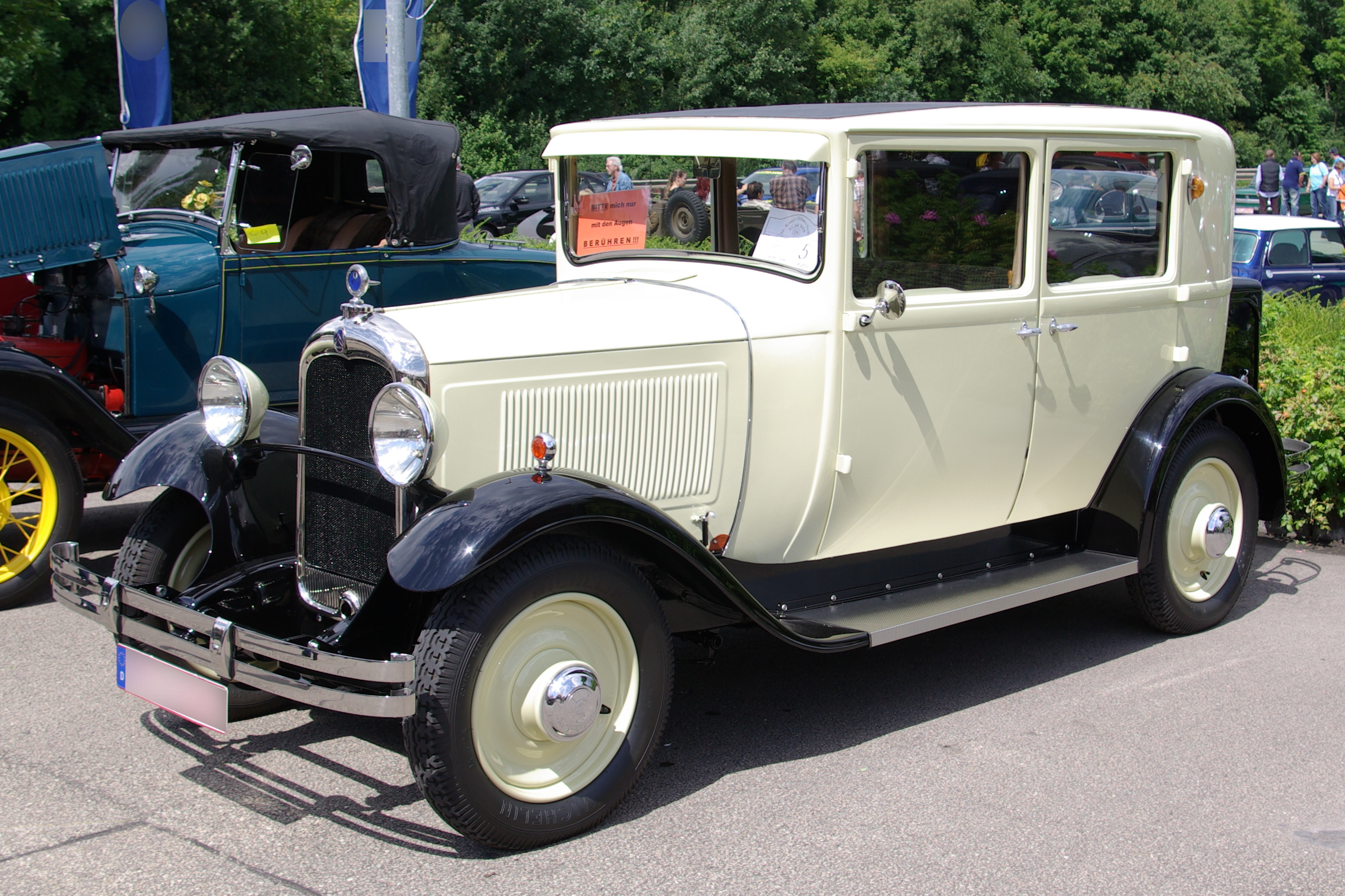 Citroen C4 Baujahr 1930 Leistung 30 PS aufgenommen bei / photographed at "Internationales Konzer Oldtimer-Treffen" am 20. Juli 2008